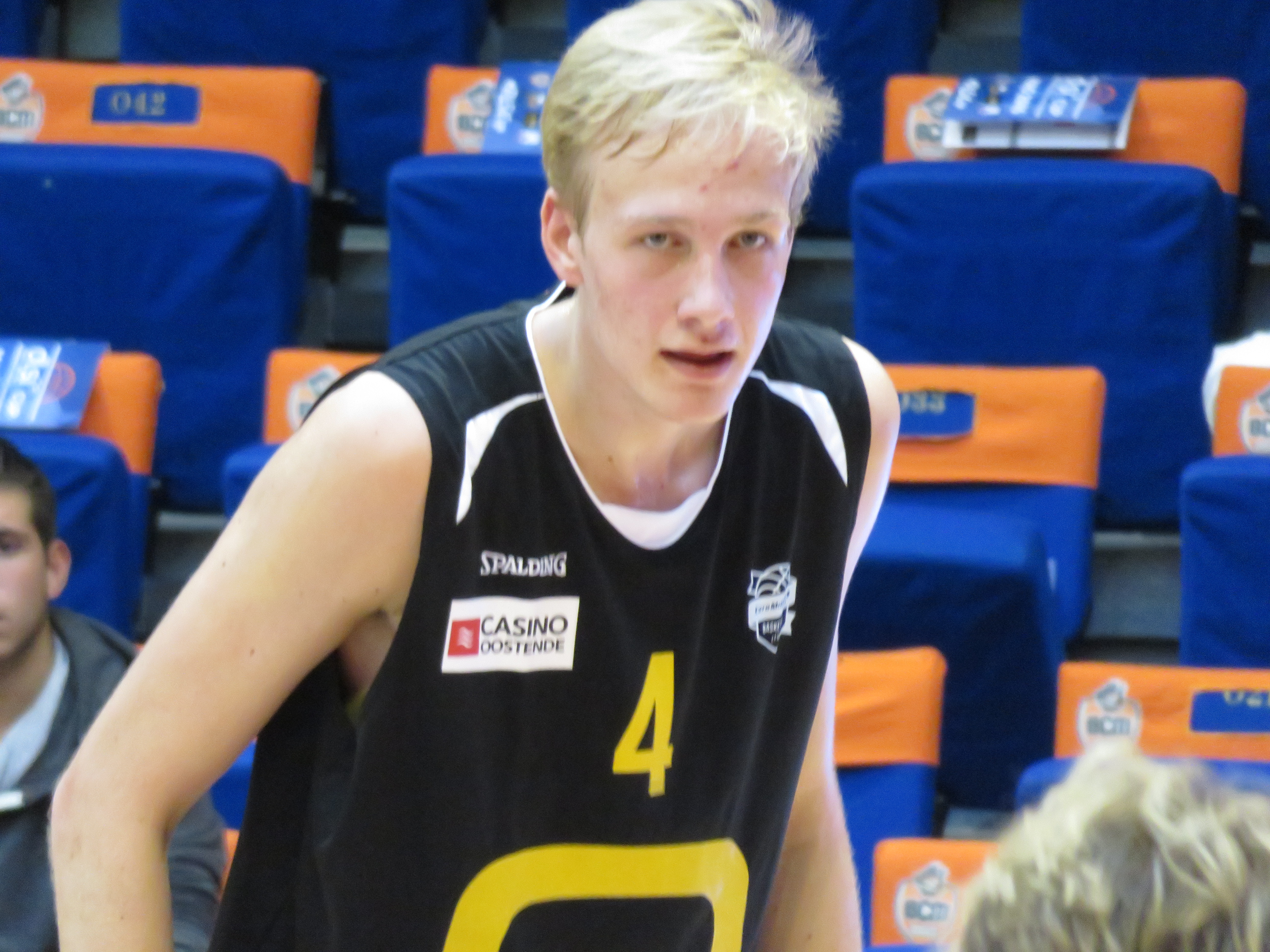 4 Tim Lambrecht